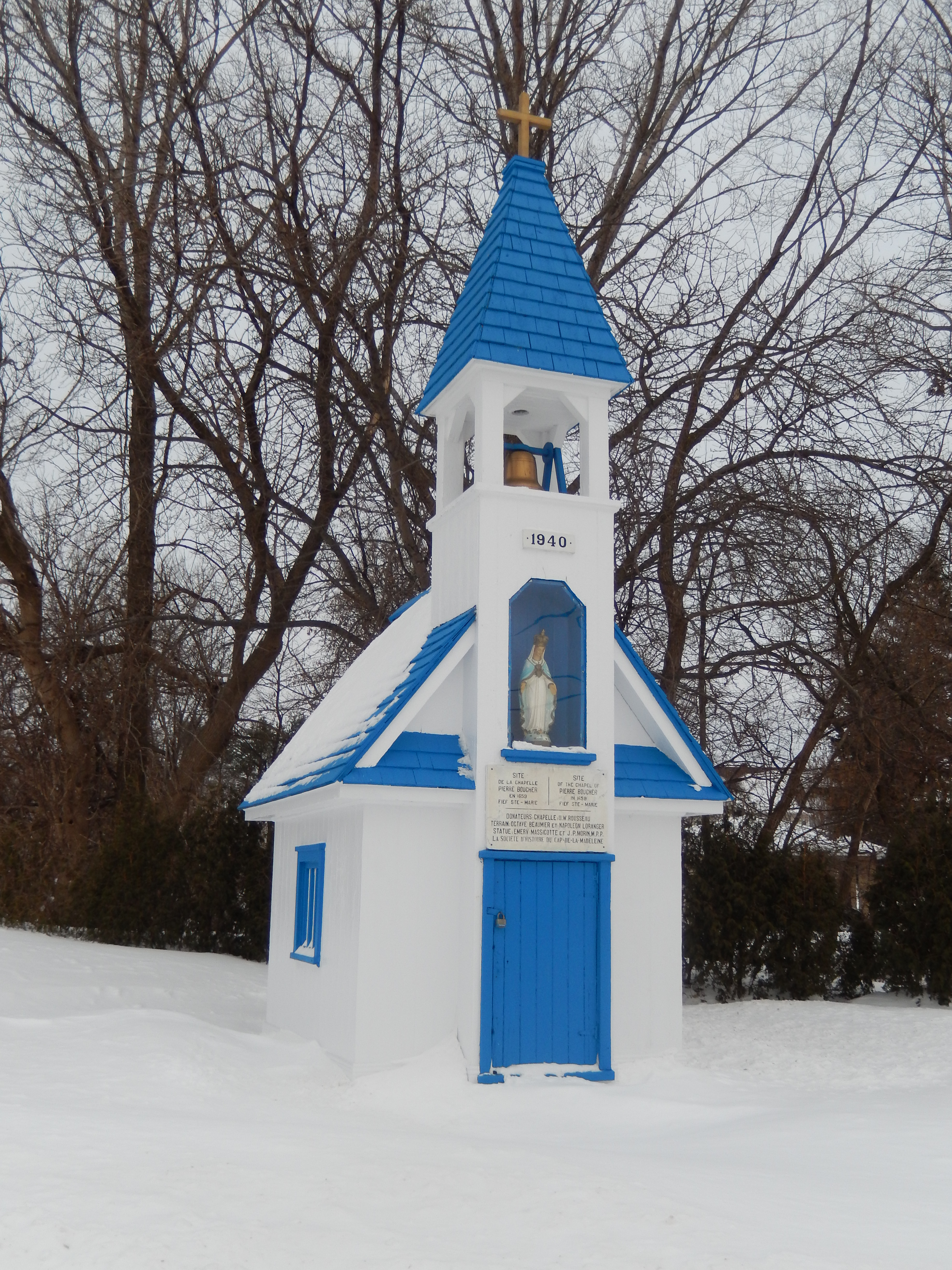 Chapelle commémorant la première chapelle construite par Pierre Boucher au fief Sainte-Marie en 1659. La chapelle a été construite en 1940.